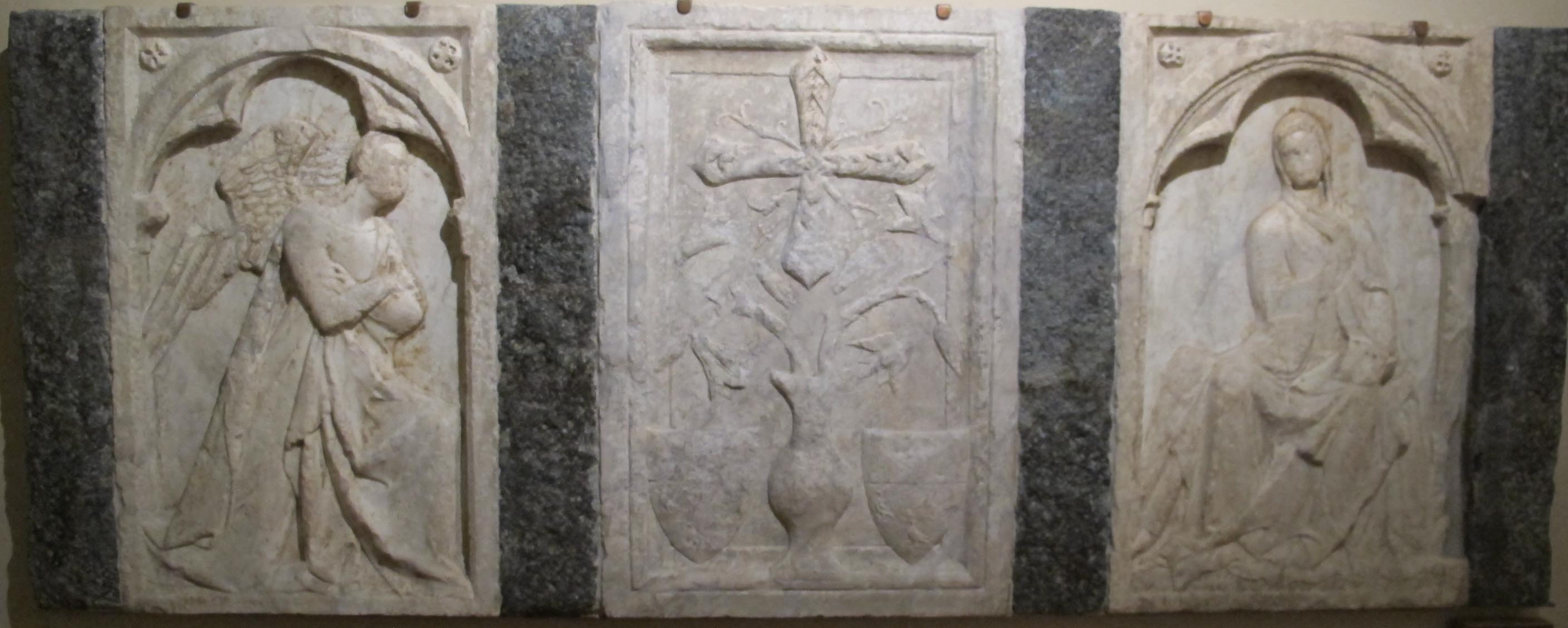 Giovanni d'agostino, annunciazione, 1338-1340, da sepolcro novellucci, fianco di s. domenico